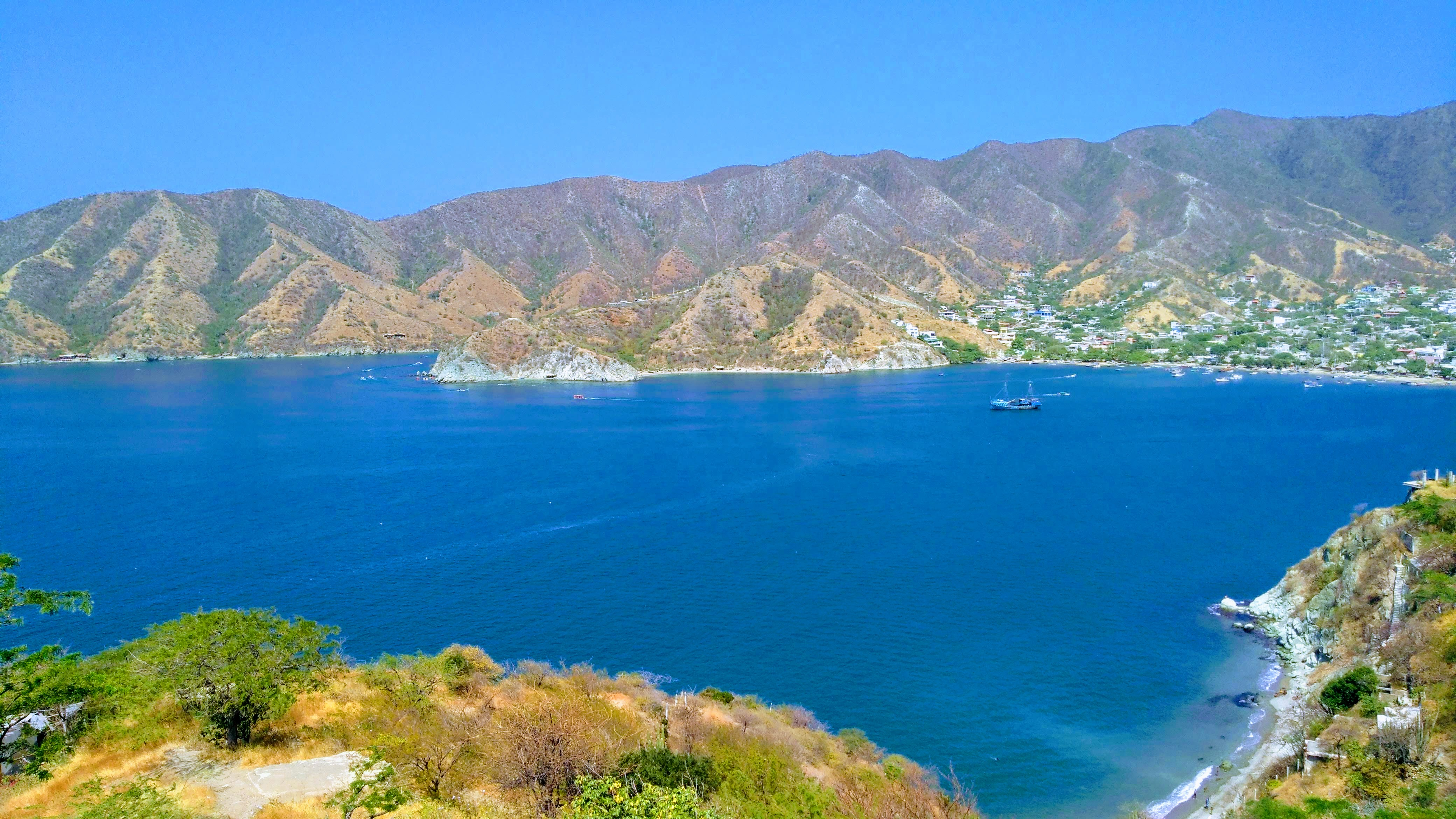 Taganga, Santa Marta, Colombia